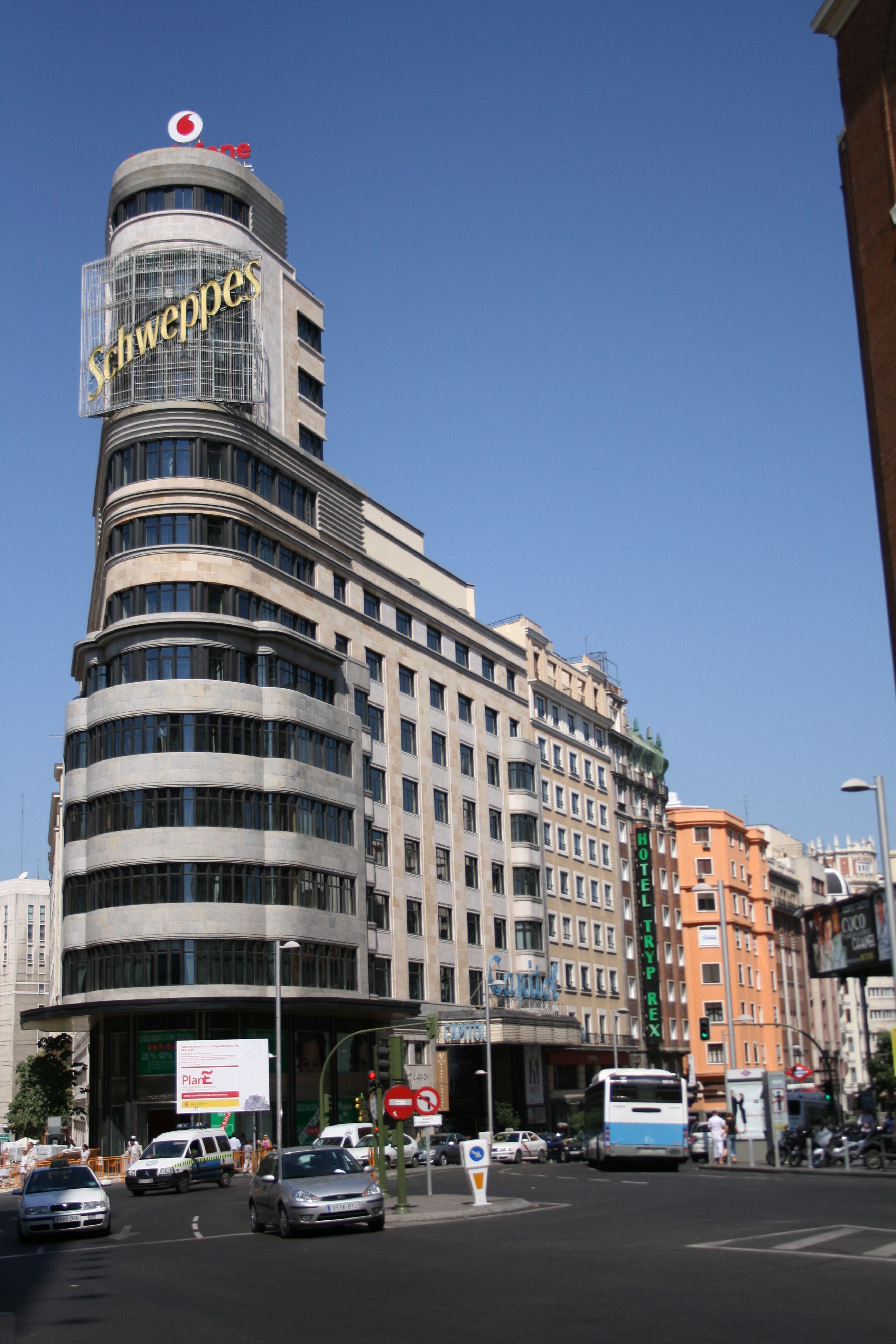 Edificio Carrión - Schweppes